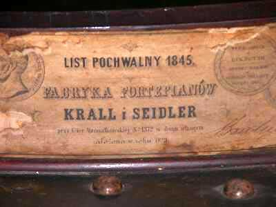 Opis w Krall i Seidler - "Na wystawie warszawskiej 1838 nagrodzeni medalem srebrnym I klasy. 1843 F. Liszt, po koncertach w Warszawie, do których spośród wielu instrumentów krajowych i zagranicznych wybrał fortepian Krall i Seidler, przesłał wytwórni list pochwalny." List pochwalny